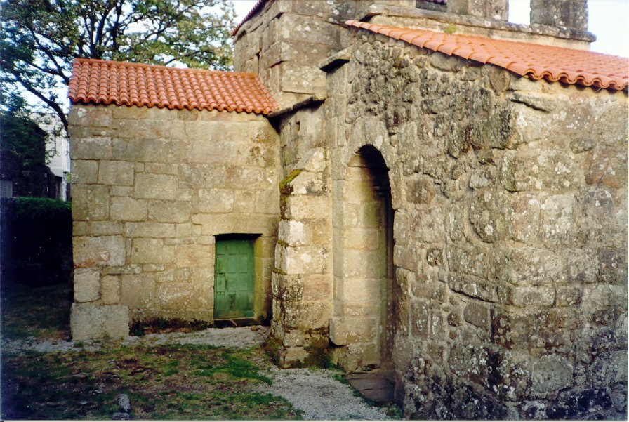 Exterior da igrexa de Santa Comba de Bande Licensing Categoría:Imaxes de Bande